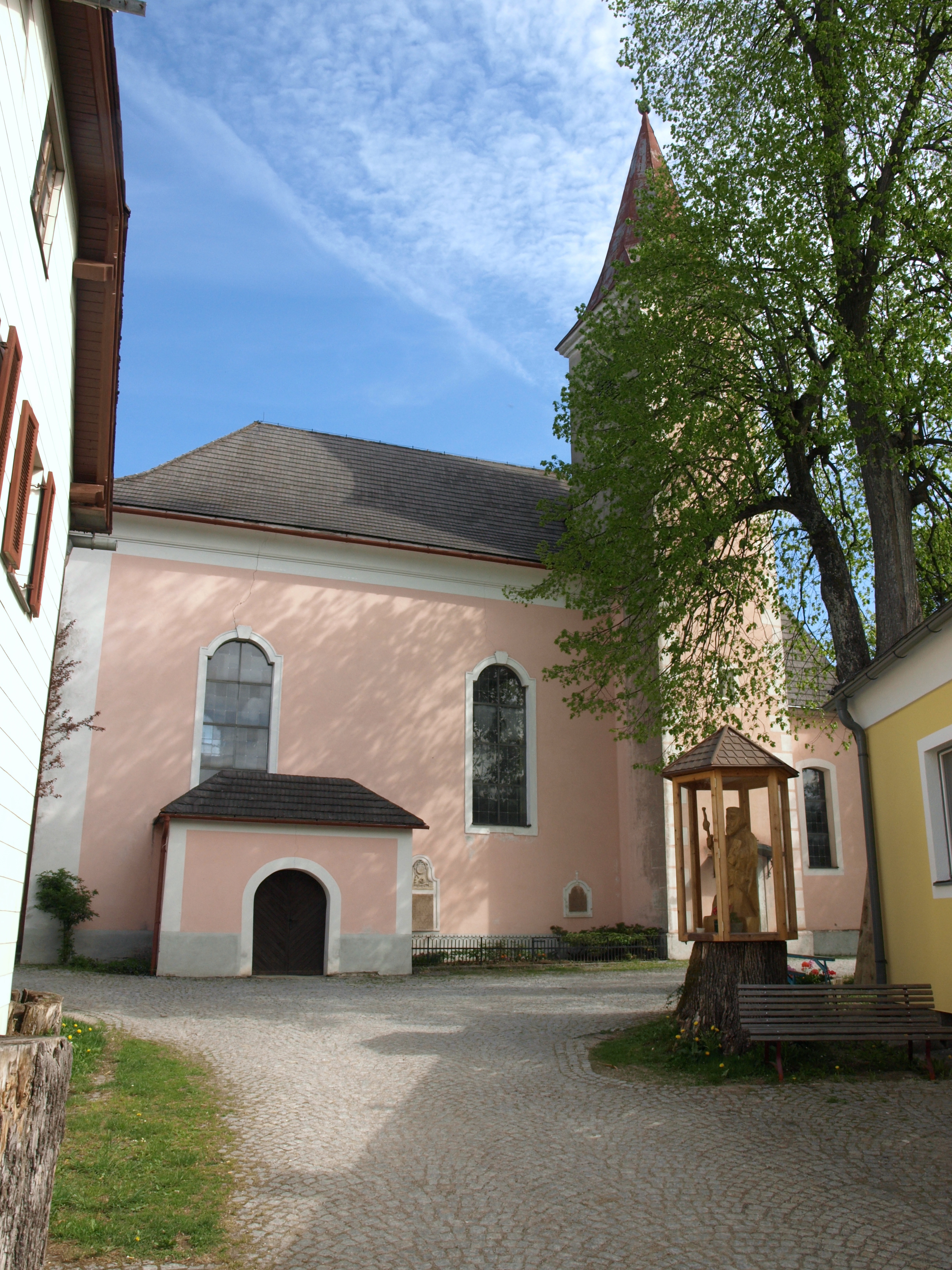 Kath. Pfarrkirche hl. Jakobus der Ältere